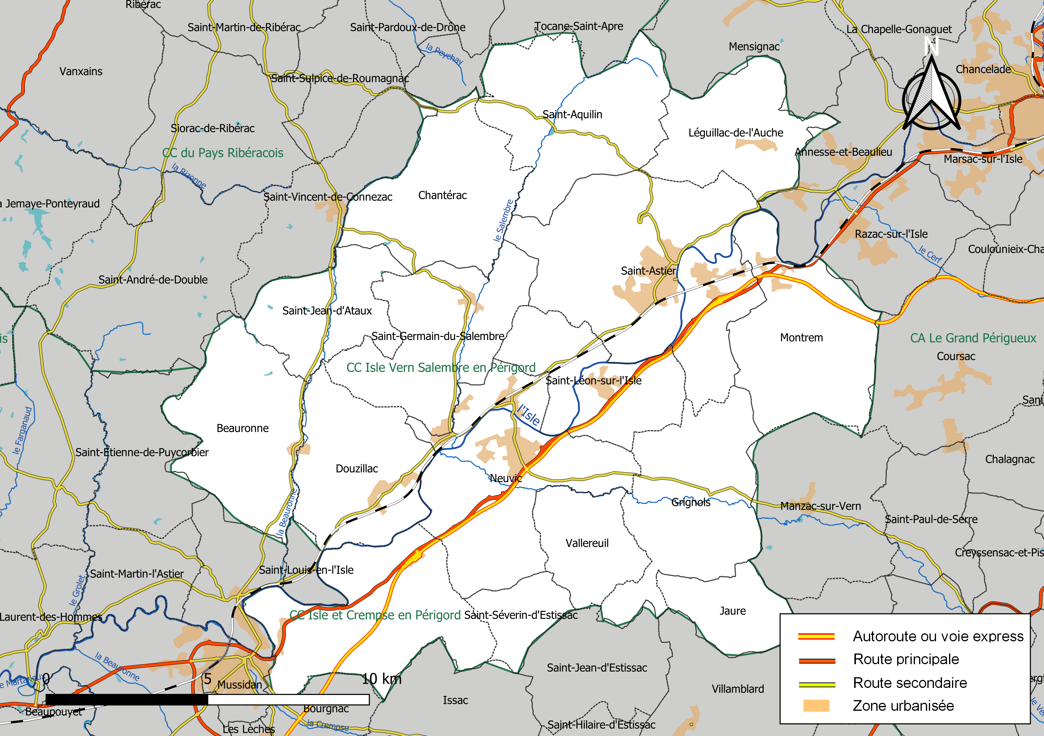 Carte géographique de la Communauté de communes Isle Vern Salembre en Périgord, département de la Dordogne, France. Composition au 1er janvier 2019.